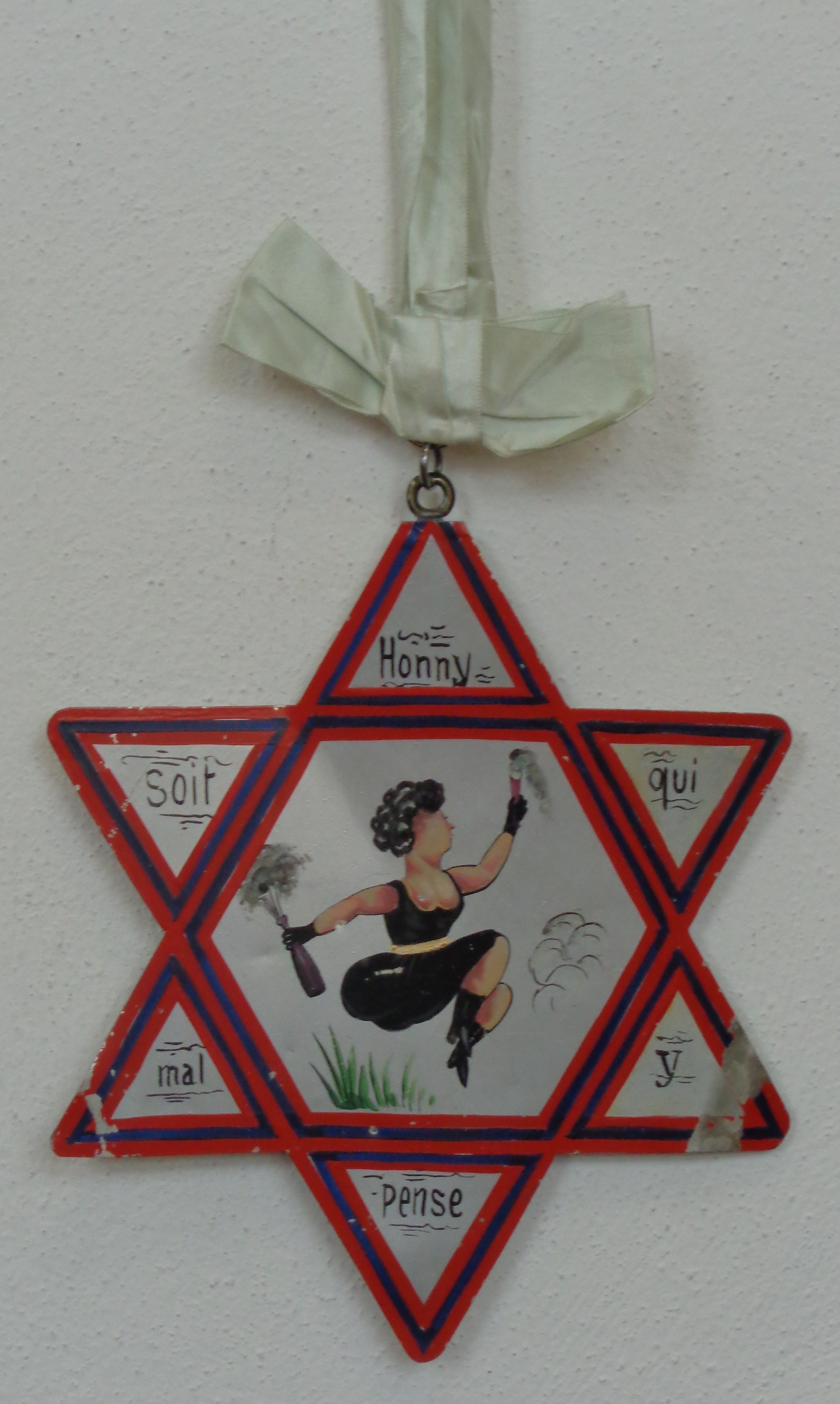 „Hosenbandorden“ des Bützower Hoftags: „Honny soit qui mal y pense!“